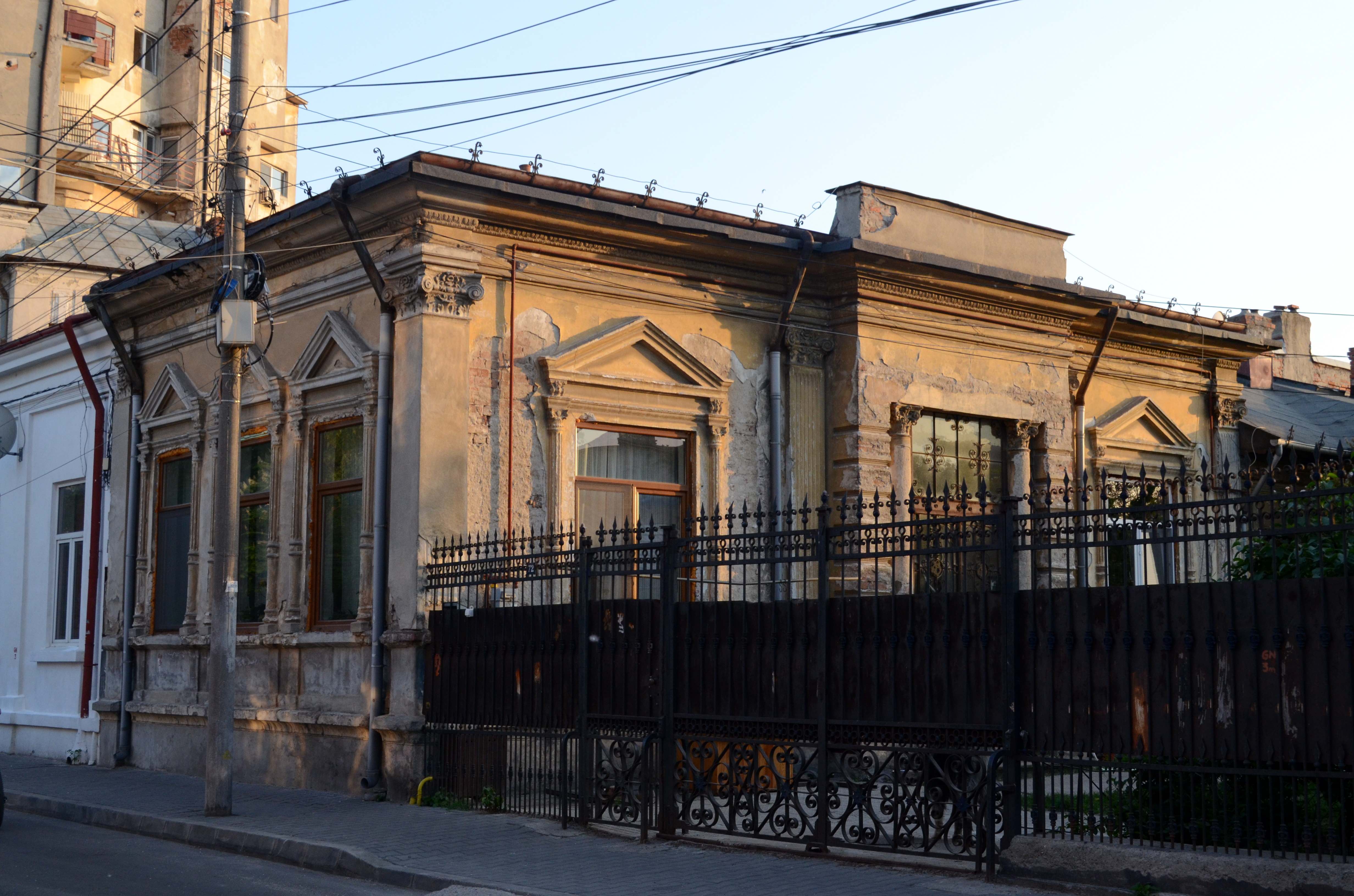 Casă, Strada Romulus nr. 72, Sector 3, București